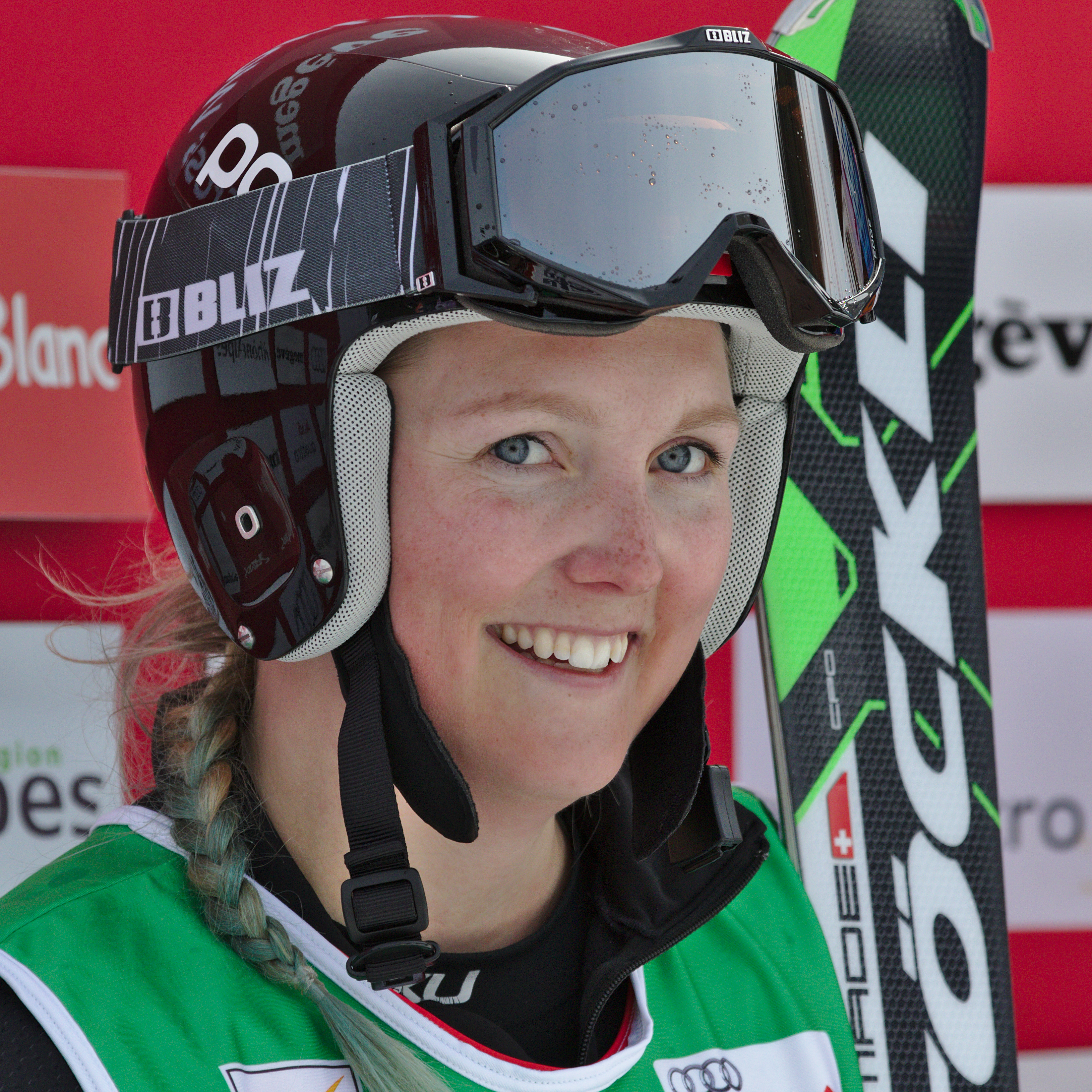 FIS Ski Cross World Cup 2015 - Megève - 20150313 - Marte Hoeie Gjefsen